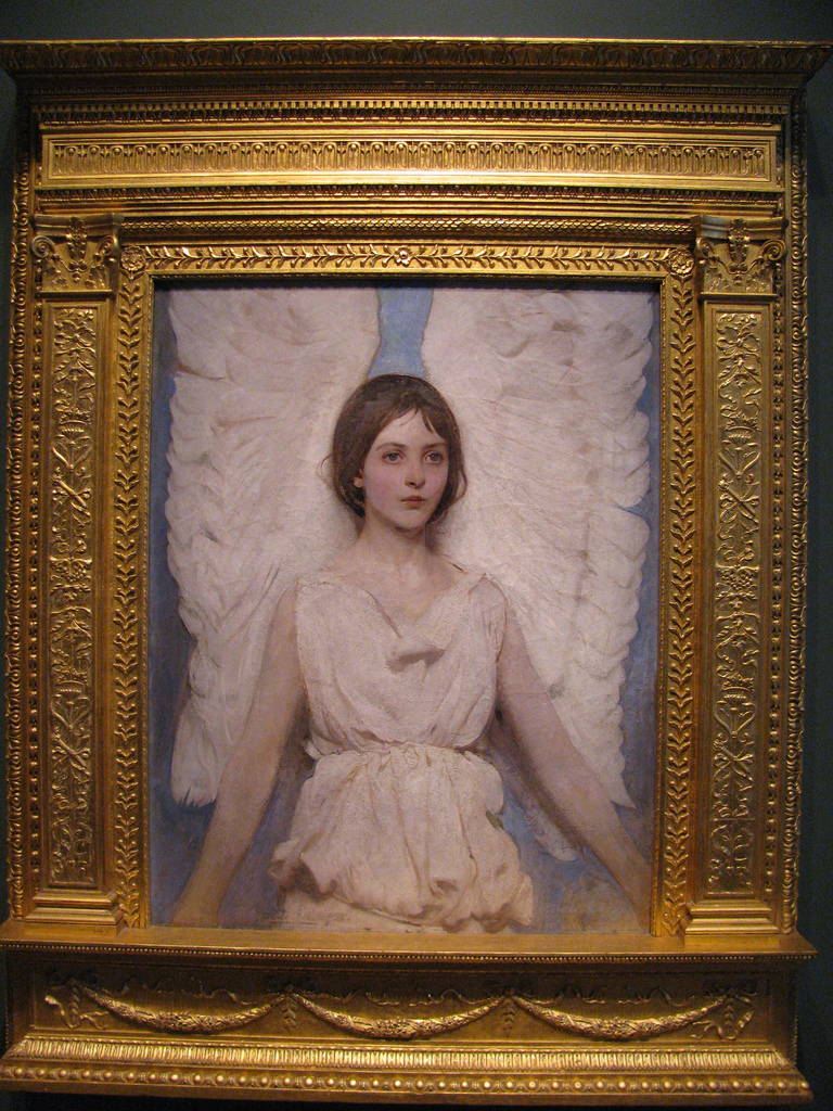 Angel